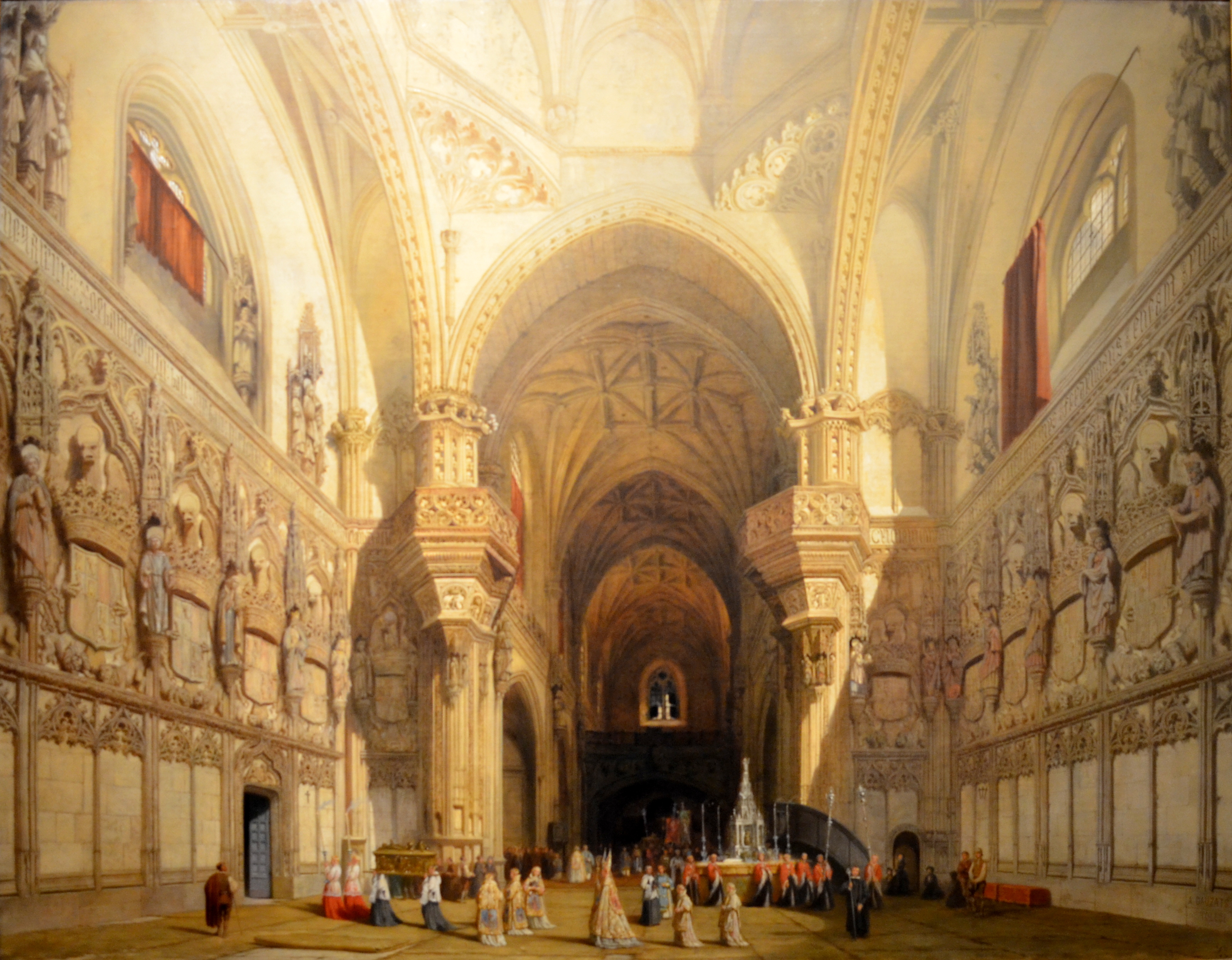 Intérieur de la cathédrale Saint-Jean-des-Rois de Tolède d'Adrien Dauzats (L'invention du passé. « Gothique, mon amour », 1802-1830, monastère royal de Brou).